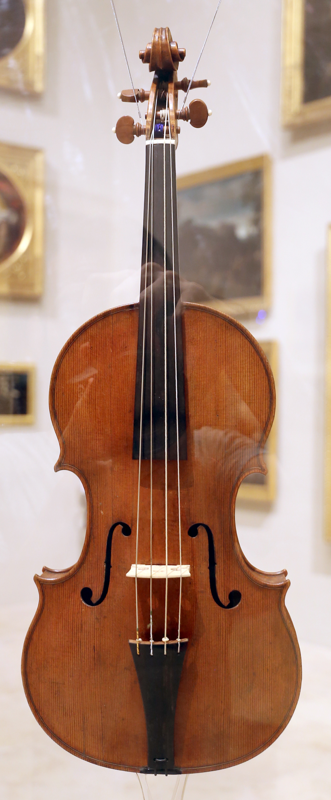 Palazzo dei Musei (Modena) This is a photo of a monument which is part of cultural heritage of Italy.